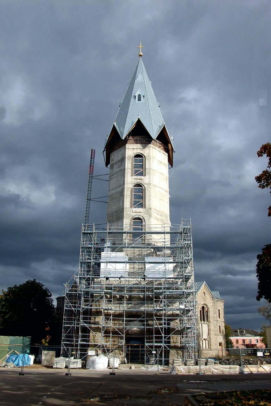 Александровская лютеранская церковь в Нарве